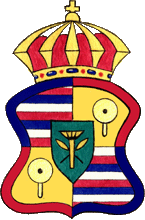 Герб